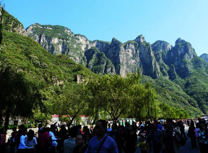 Yuntai mountain